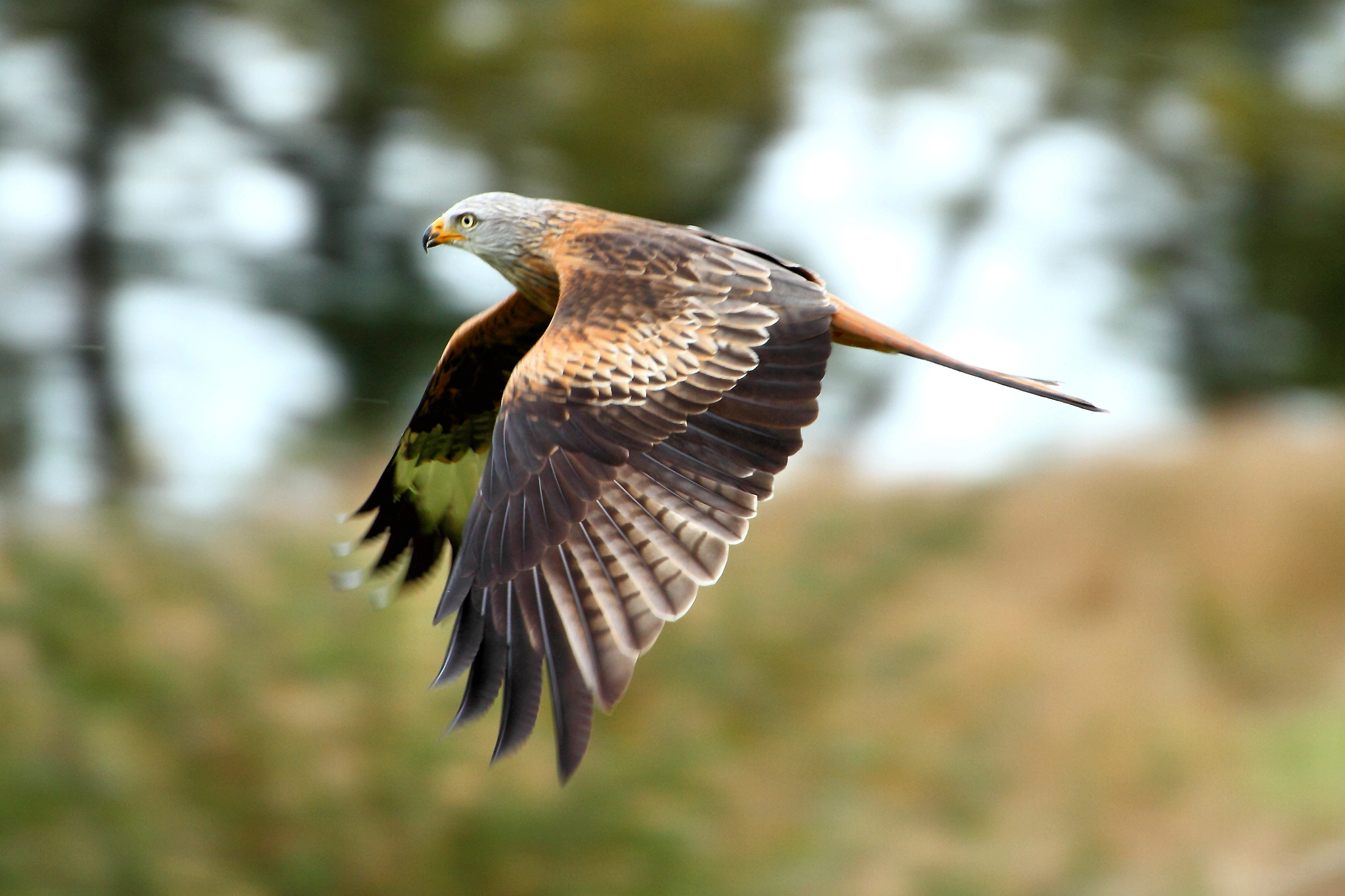 Red Kite - Gigrin Farm